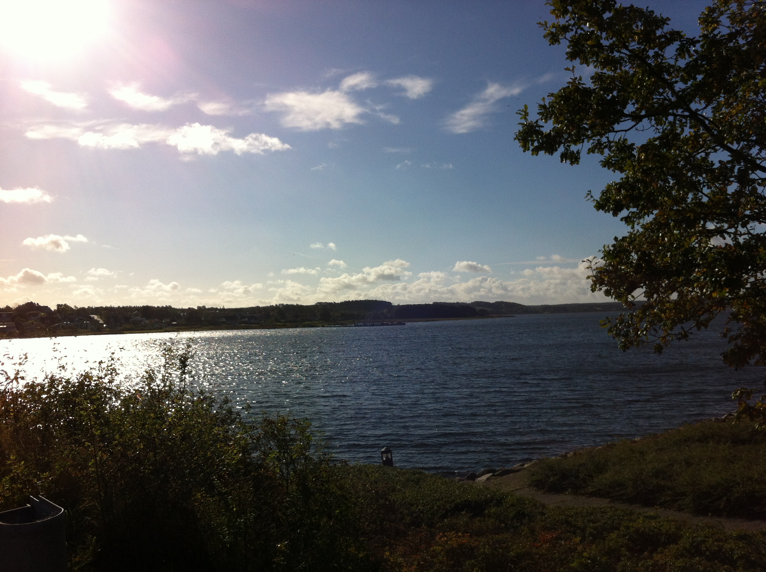 Billede er tagede ved Hadsundbroen.